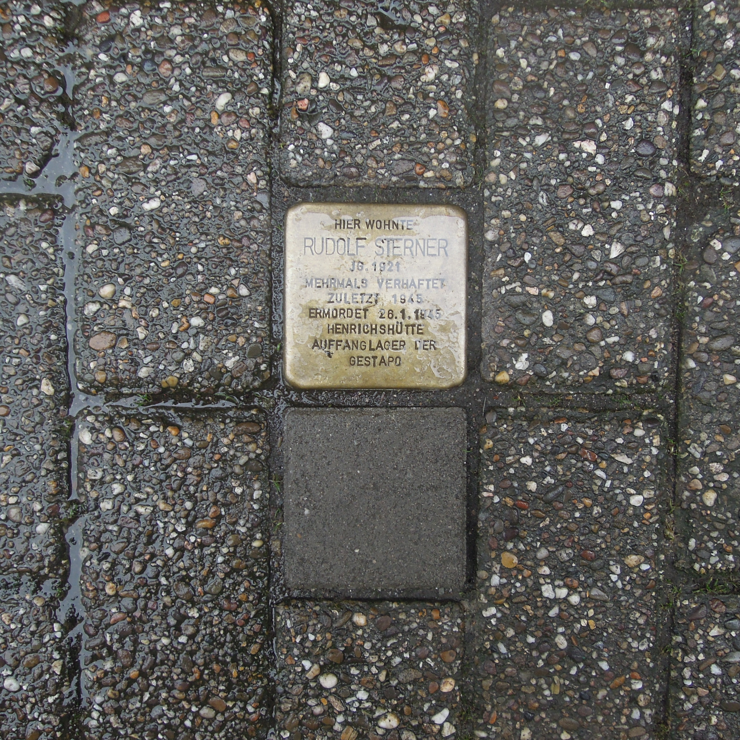 Stolpersteine Hattingen Steinhagen 8